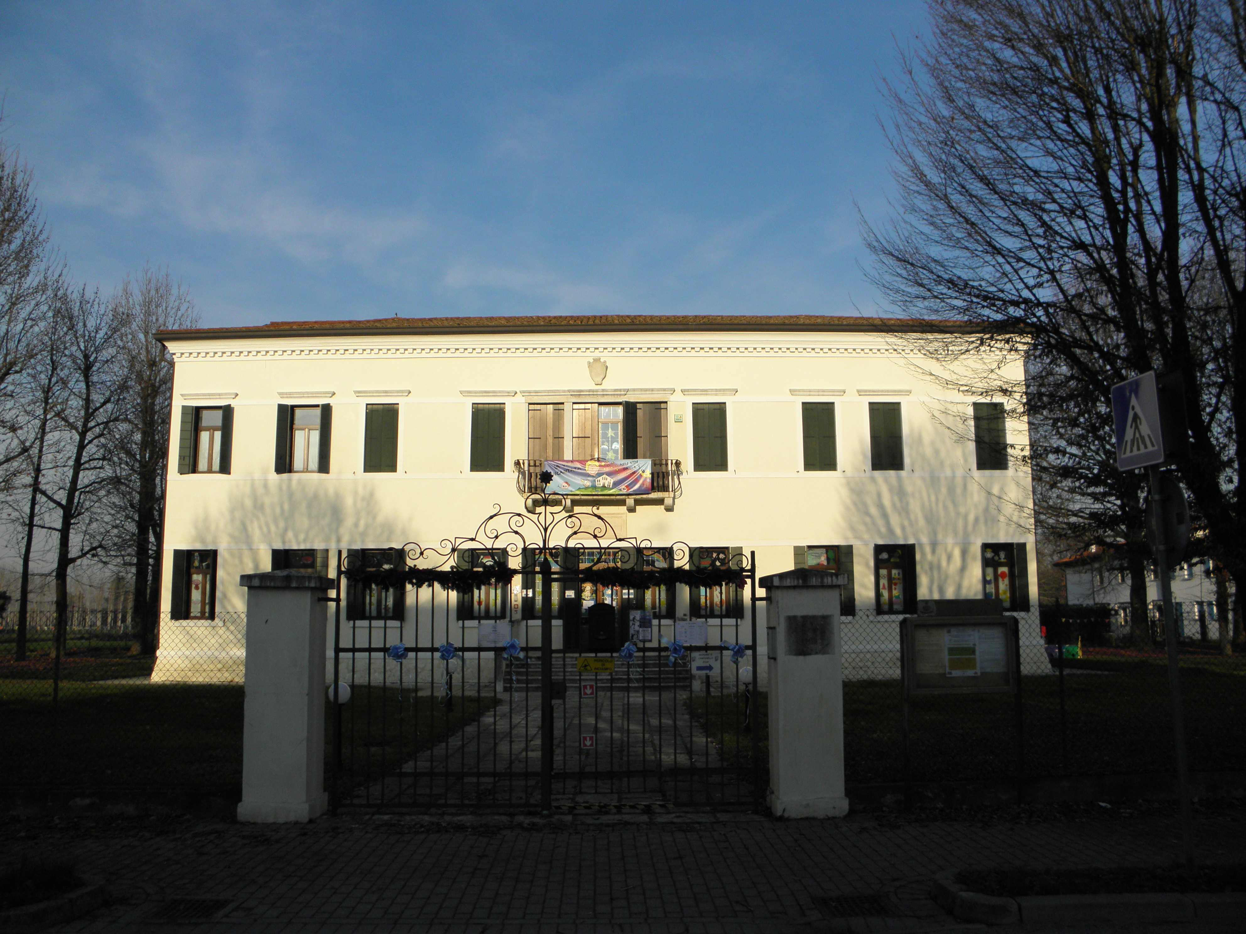 Spinea, località Crea: la Villa Barbarigo Pisani Diodà, già sede della scuola elementare Parini e dagli anni duemiladieci sede dell'asilo nido "La Villa Incantata".